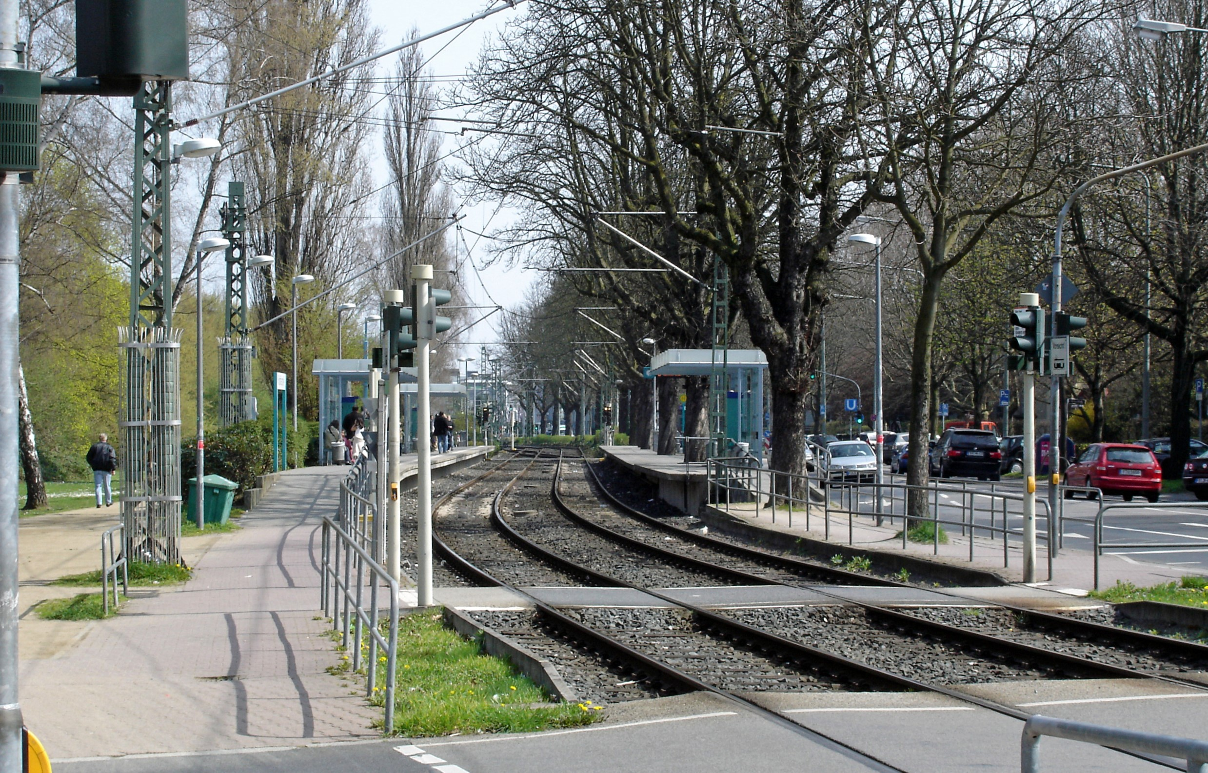 Station Schaefflestrasse in Ffm-Riederwald, Blick-Richtung: Osten